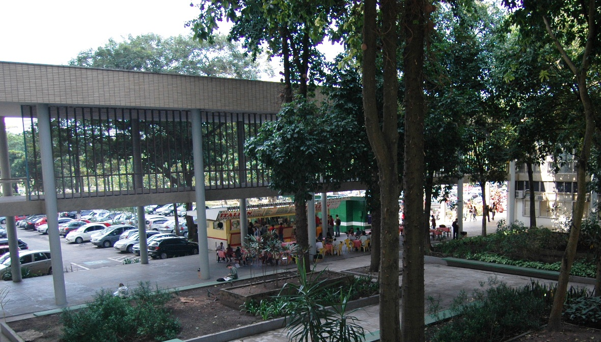 Área externa do CT da UFRJ.